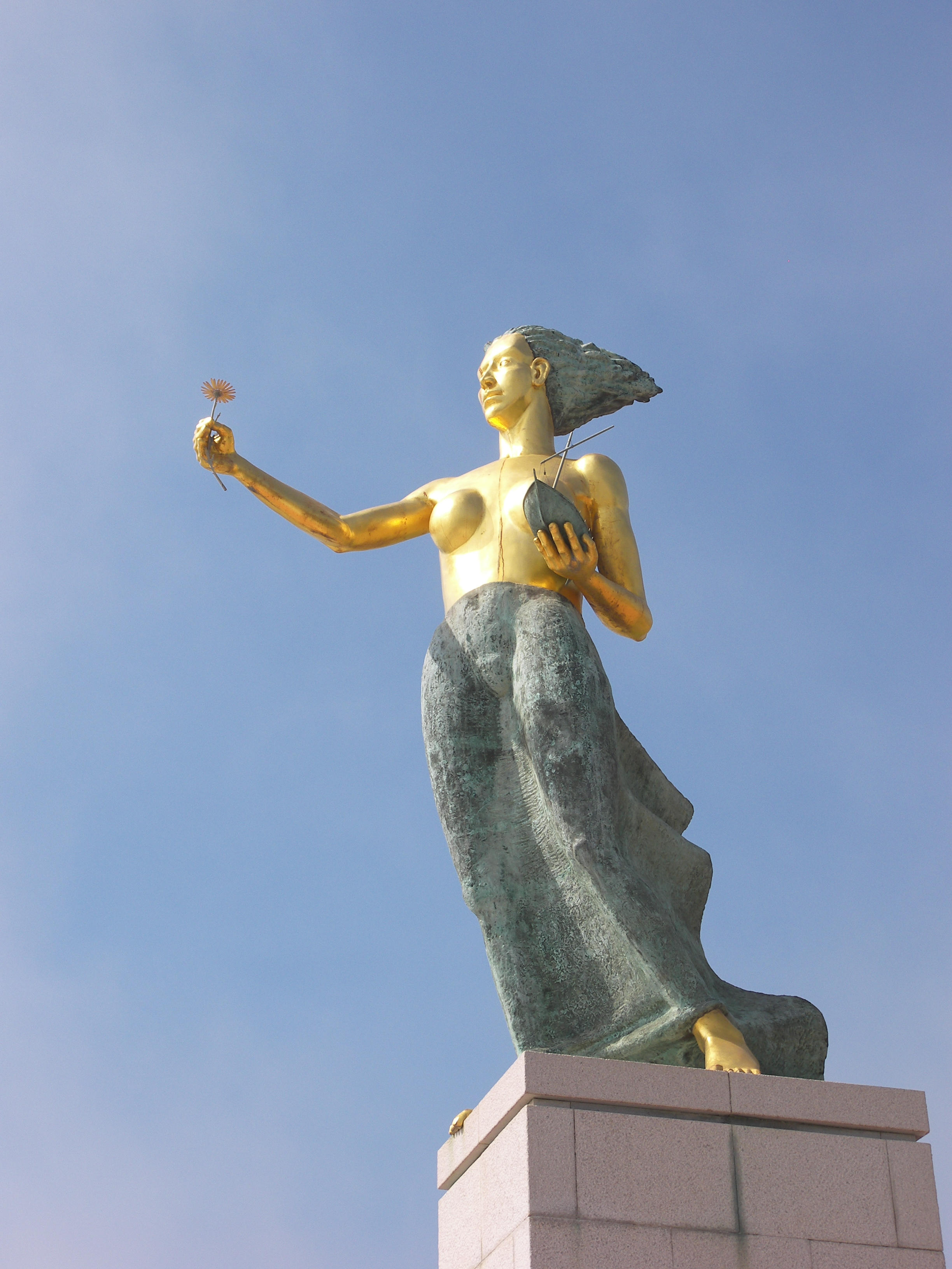 Viana do Castelo, Statue an der Rochetta